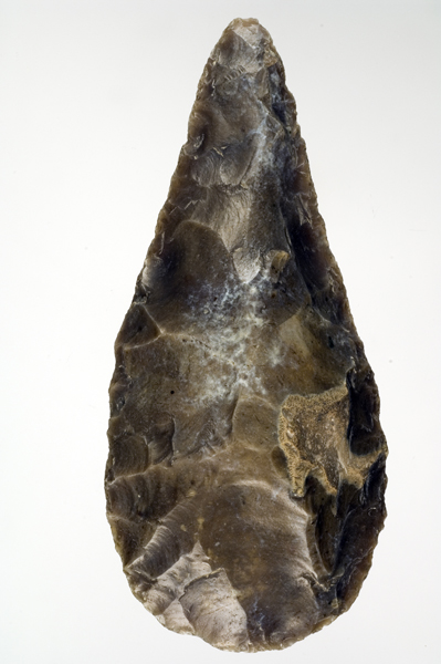 Bifaz del Manzanares (Achelense). Número de inventario: 1942-101-4-4723.